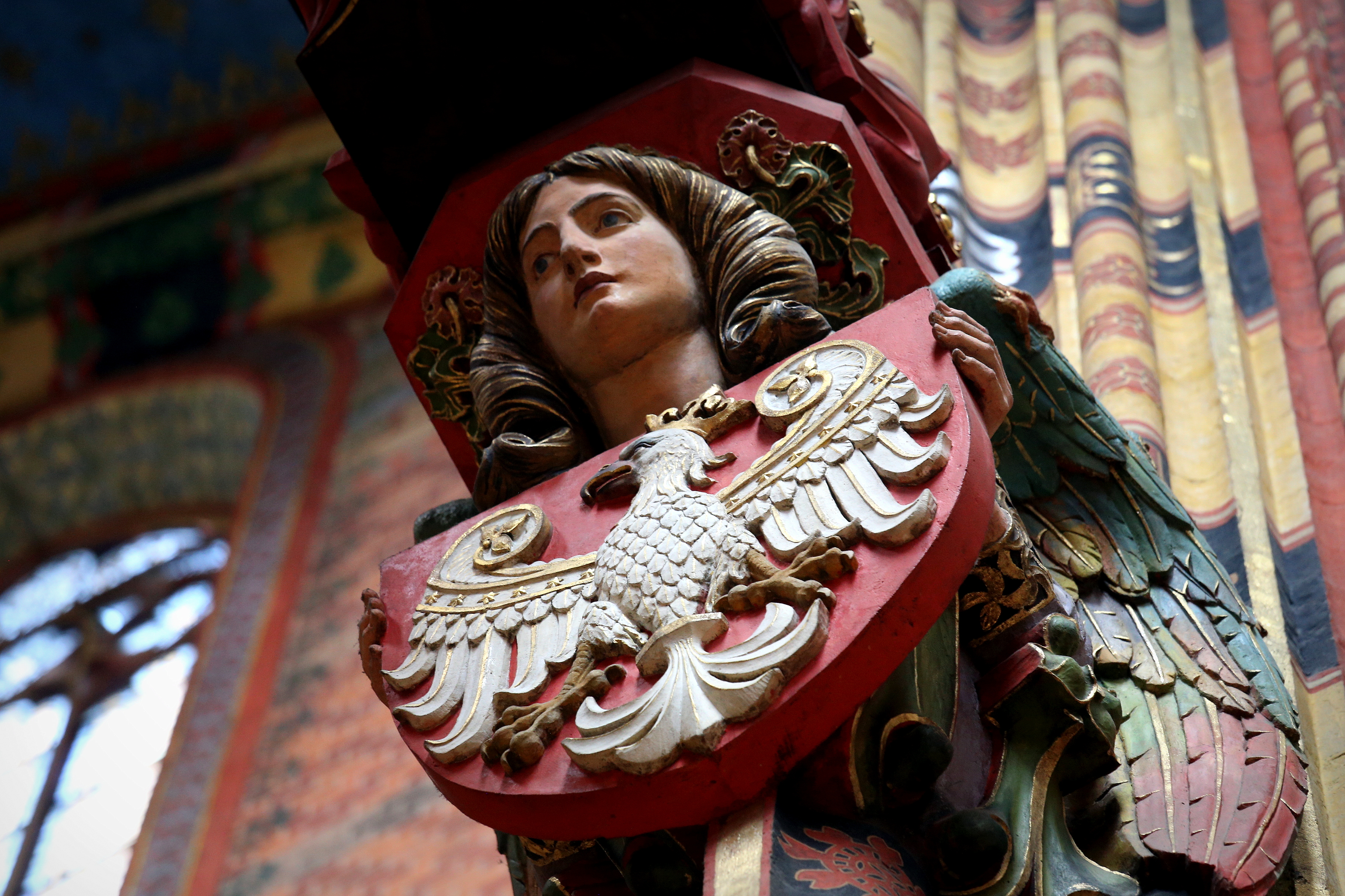 Mária-templom, Krakkó. St. Mary's Basilica, Kraków. Kościół Mariacki w Krakowie.